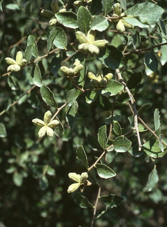 Quillaja saponaria, Quillajaceae - Chile, Santiago de Chile, Cerro San Cristóbal, Jardín Mapulemu